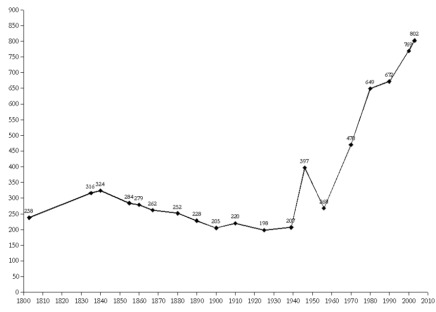 Graph der Einwohnerzahlen von Meddewade (Schleswig-Holstein) von 1803 bis 2003